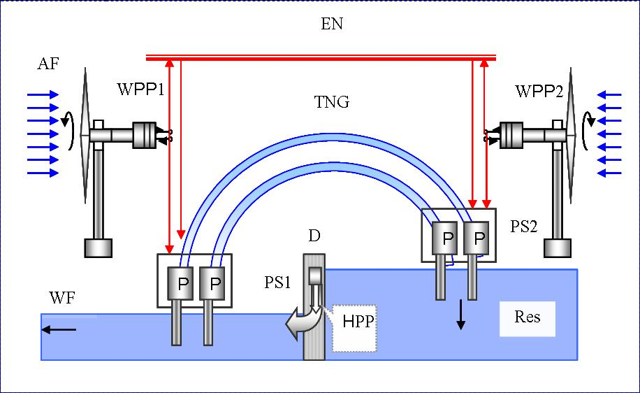 Вітротубінна гідроакумулювальна електростанція на основі існуючої руслово-греблевої ГЕС